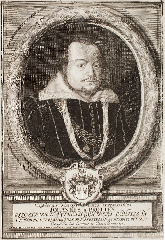 Bildnis des Johann von Prott (1573-1634). Der Geheime Rat und Kanzler des Grafen Anton Günther von Oldenburg und Delmenhorst, Herrn zu Jever und Kniphausen usw., ist in einem von einem Ehrenkranz gerahmten Medaillon dargestellt. Die Orden um seinen Hals bezeugen seine politische Stellung. Bildunterschrift: "MAGNIFICUS NOBISIS SIMUS ET CSARISSIMUS, / JOHANNES a PROTTEN, ILLUSTRIS: Dm ANTHONII GUNTHERI COMITIS IN/ OLDENBURG ET DELMENHORST, DYN: IN JHEVEREN ET KNIPHAUSEN, & C:/ Consiliarius intimus et Cancellarius & C.". (Fol. 256 in der Winkelmannchronik (1671), worin sich der Kupferstich auch befindet.)